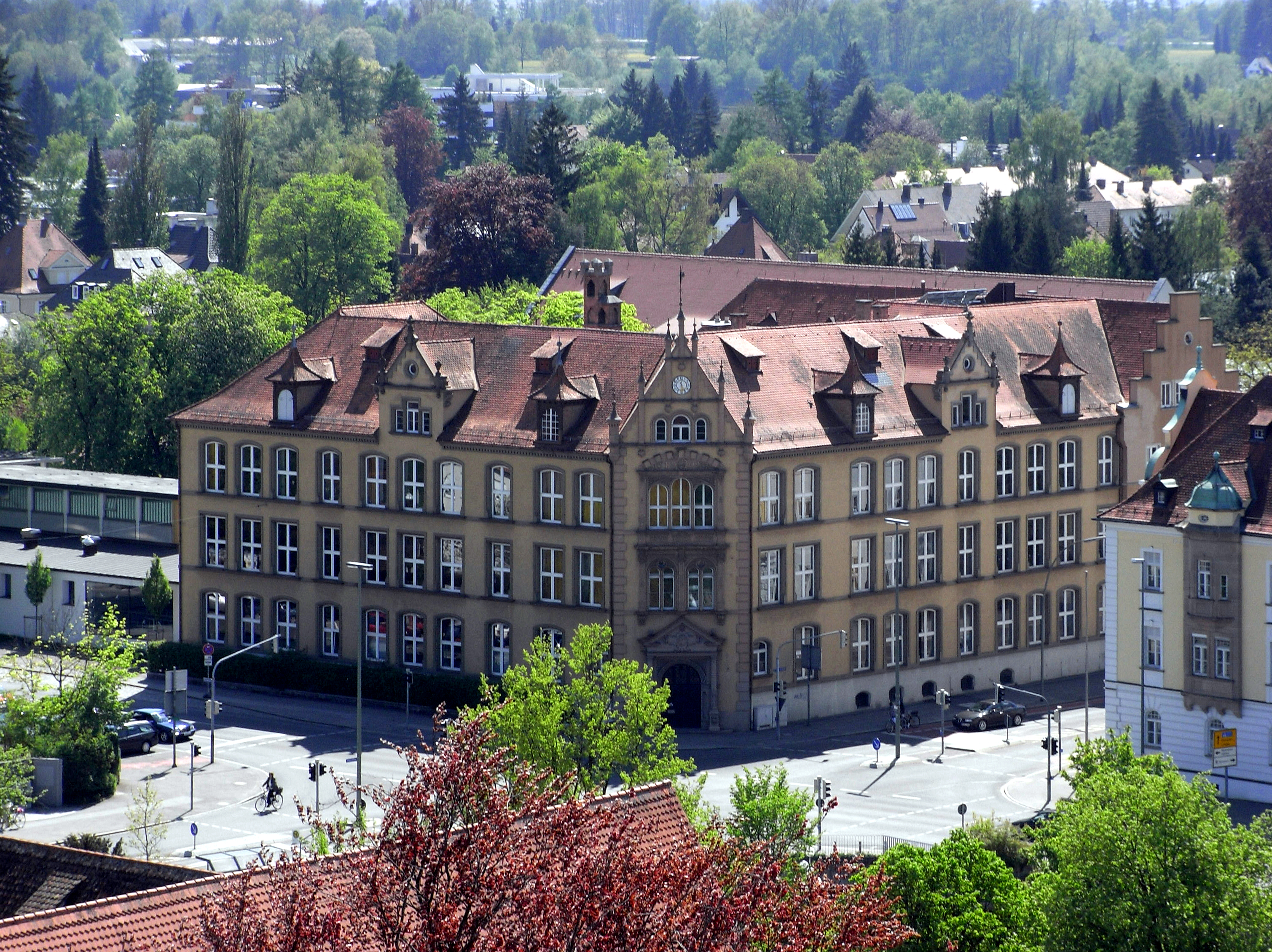 Die Bismarckschule zu Memmingen. Fotografiert vom Turm von St. Martin.